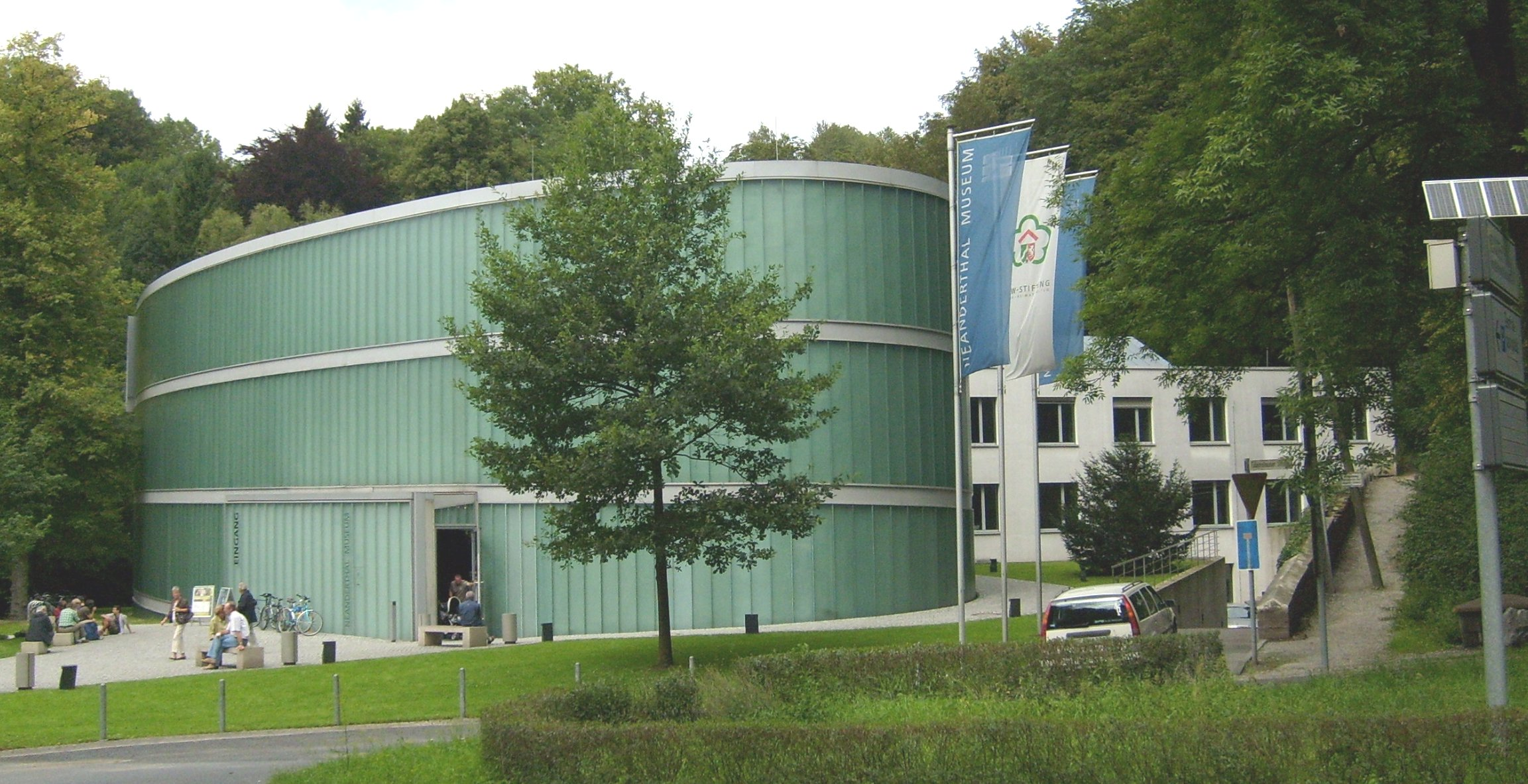 Das neue Neandertalmuseum - 1997 neu an Stelle des alten Hotel / Restaurants "Neanderhof" direkt an der Verbindungsstraße (L357) zwischen Erkrath und Mettmann errichtet